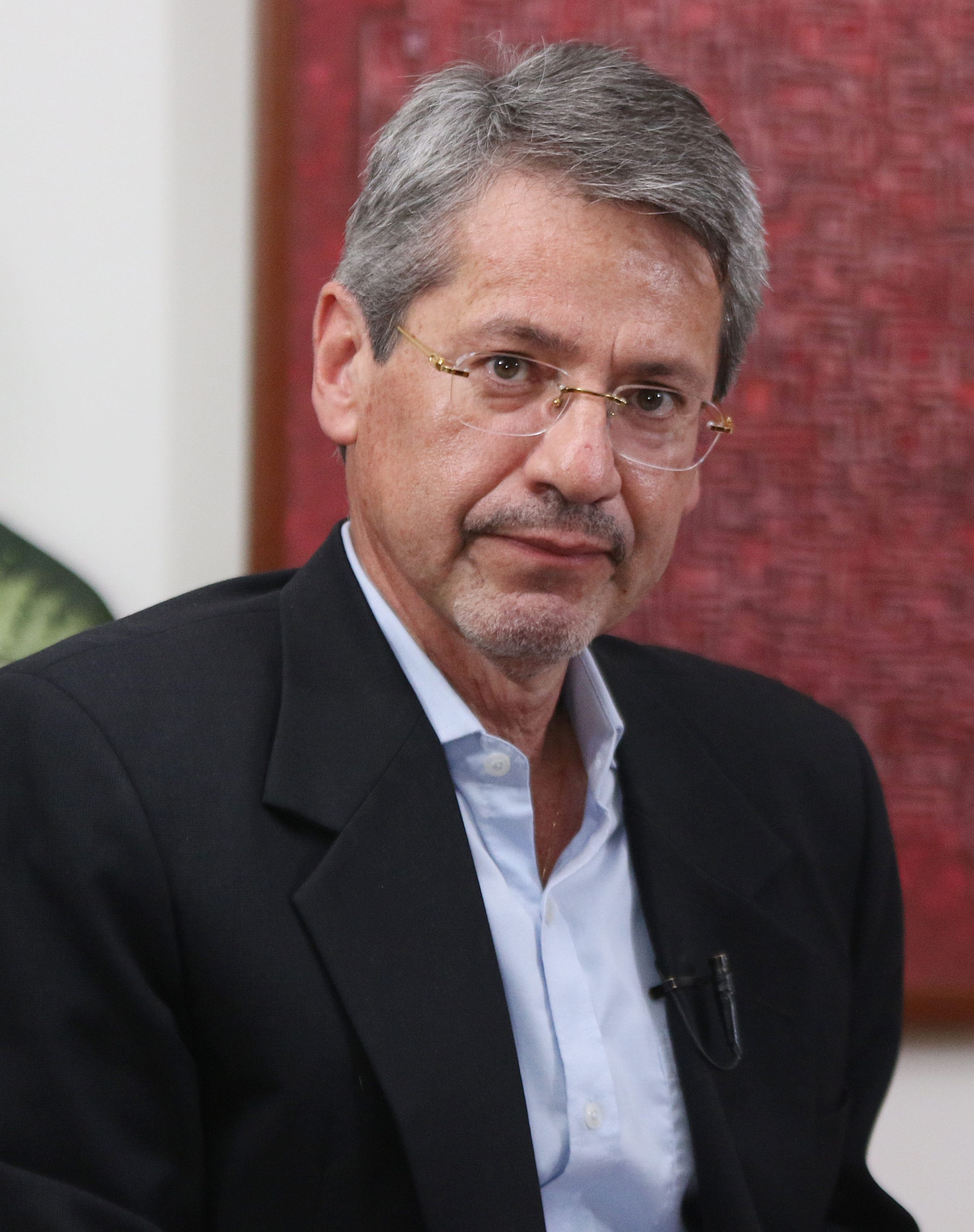 Quito, 01 jul (Andes).- Raúl Vallejo Ministro de Cultura en entrevista con Marco Antonio Bravo, Director del programa Ecuador No para, en la cuál se abordó el tema de Ley de Cultura. ANDES/Micaela Ayala V. RAUL VALLEJO Quito, 01 jul (Andes).- Raúl Vallejo Ministro de Cultura en entrevista con Marco Antonio Bravo, Director del programa Ecuador No para, en la cuál se abordó el tema de Ley de Cultura. ANDES/Micaela Ayala V.